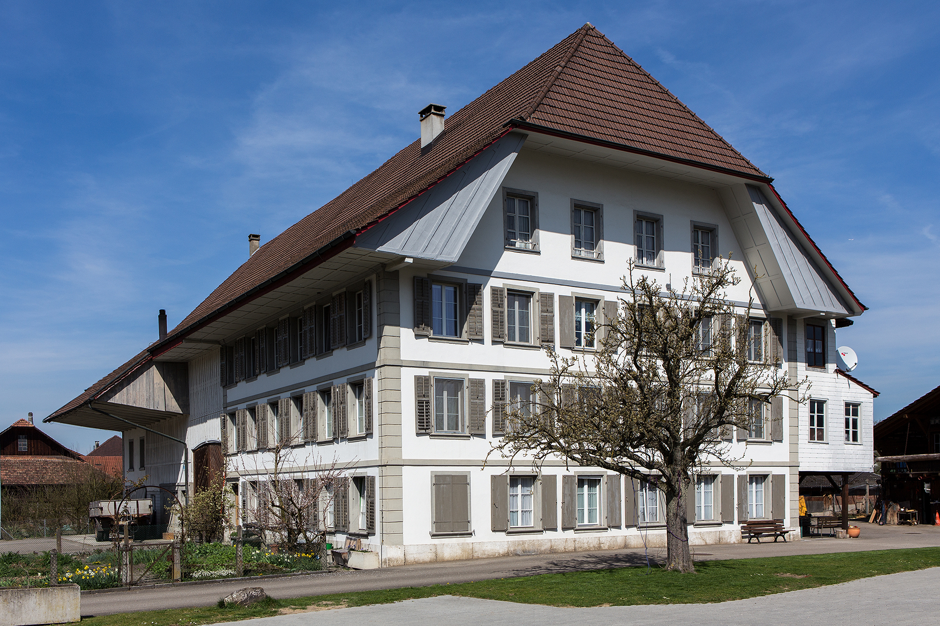 Bauernhaus Kunz, gemauertes Bauernhaus mit dreigeschossigem Wohnteil (um 1840), in Strengelbach (AG)